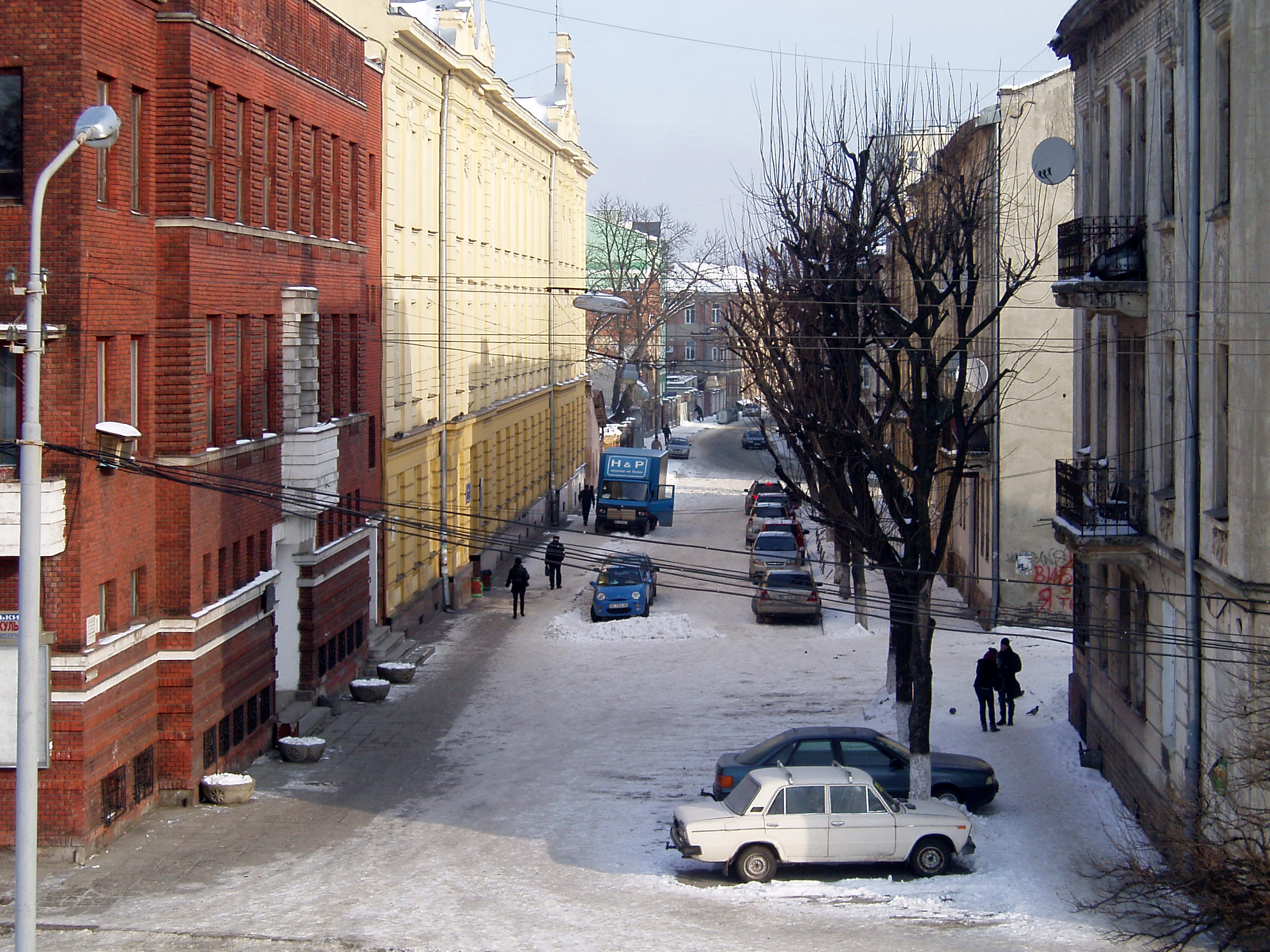 Вулиця Кушевича у Львові.